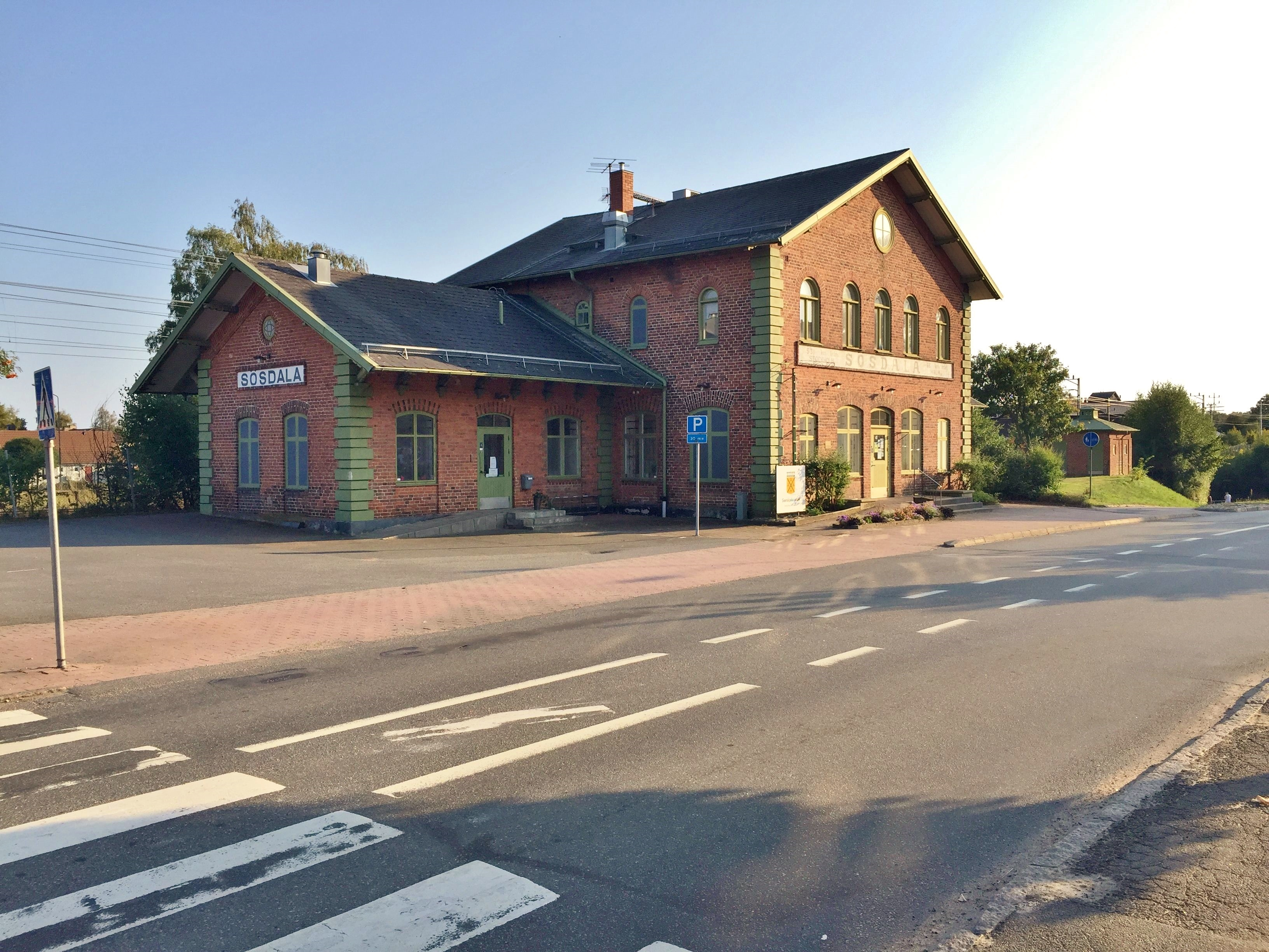 Sösdala station vid Södra stambanan.